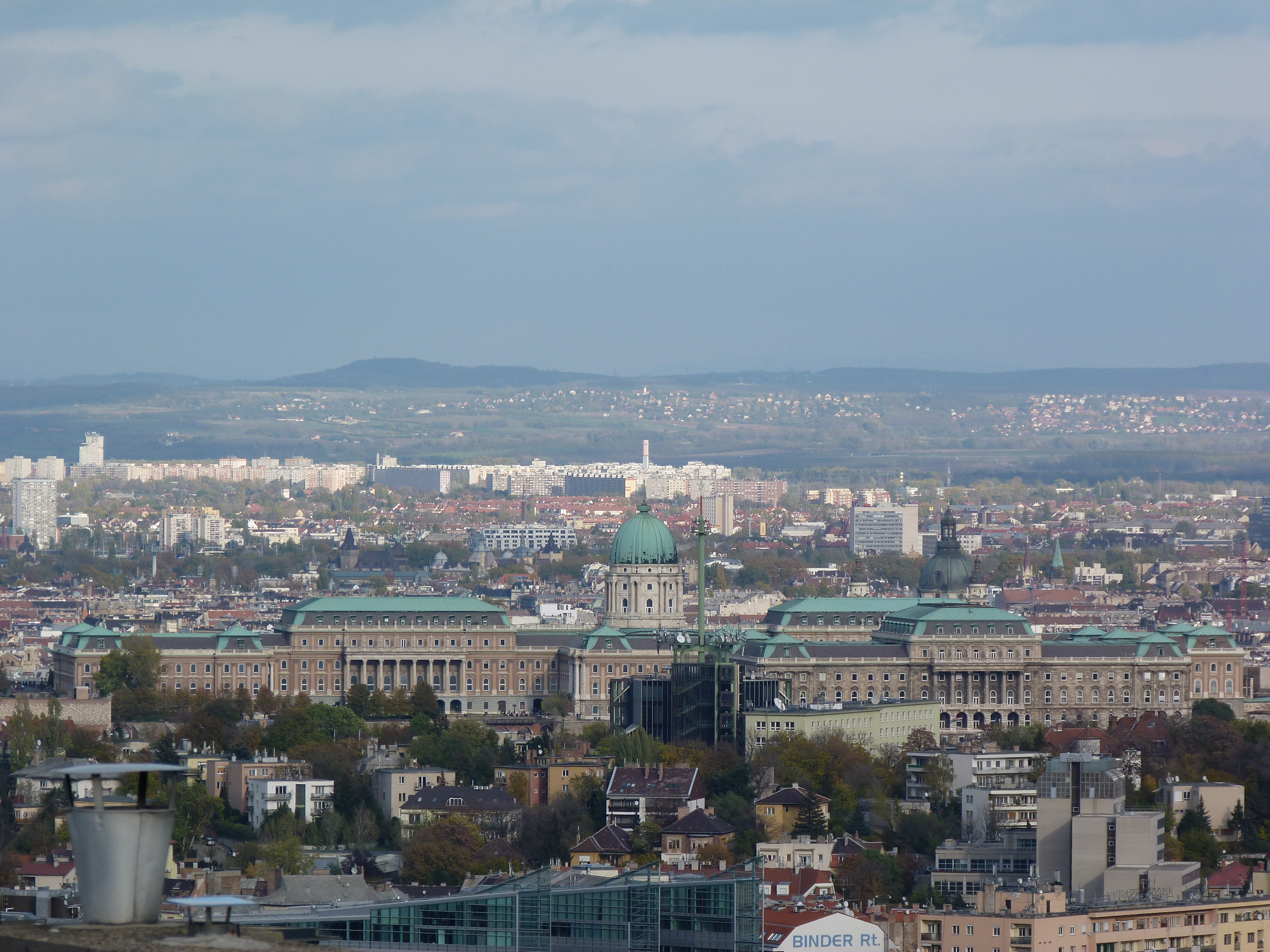 A felvétel 2012. november 4 -én készült Budapesten, a Sashegy 3. számú magaslati pontjáról. Királyi Vár.